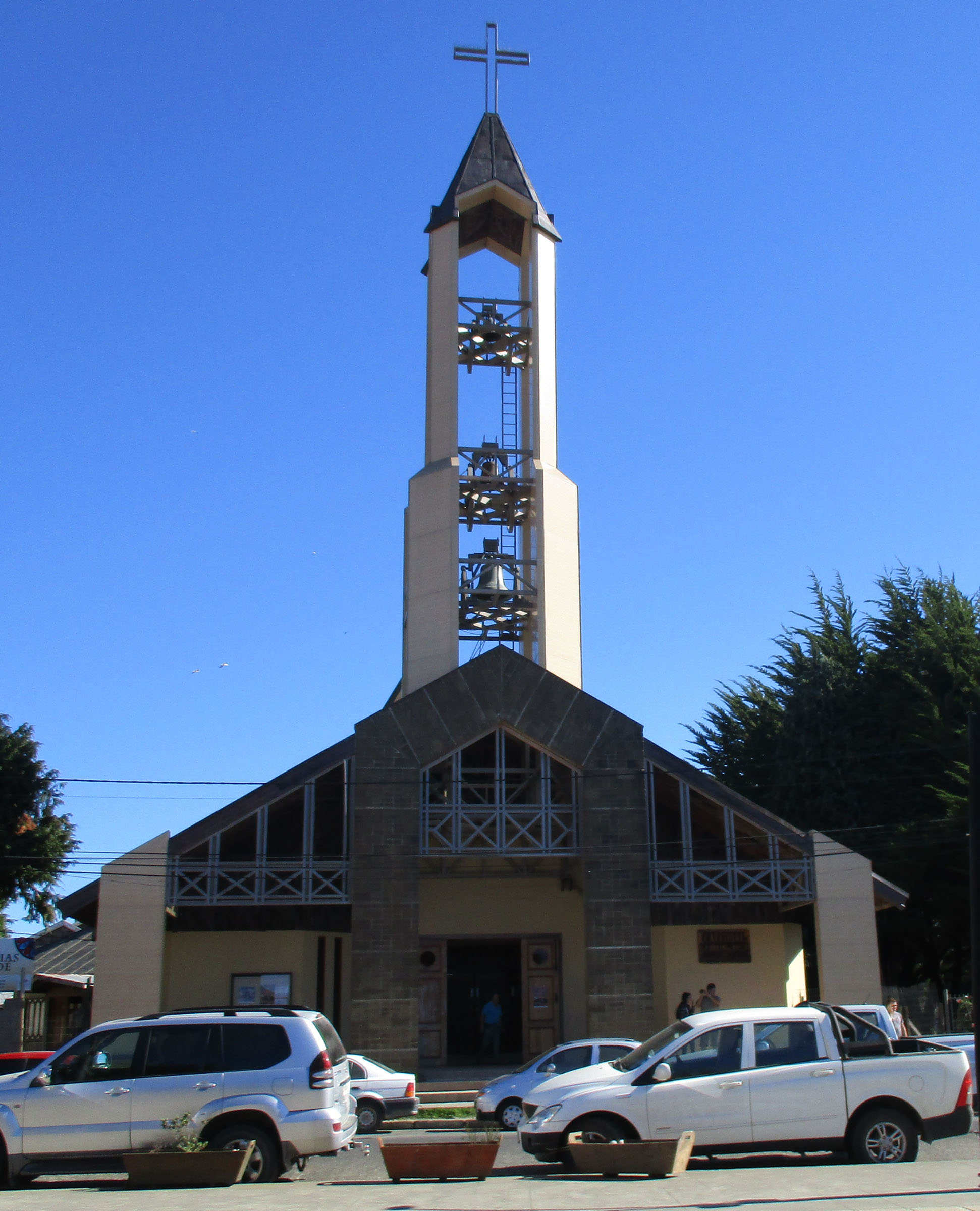 Chiloe, Ancud